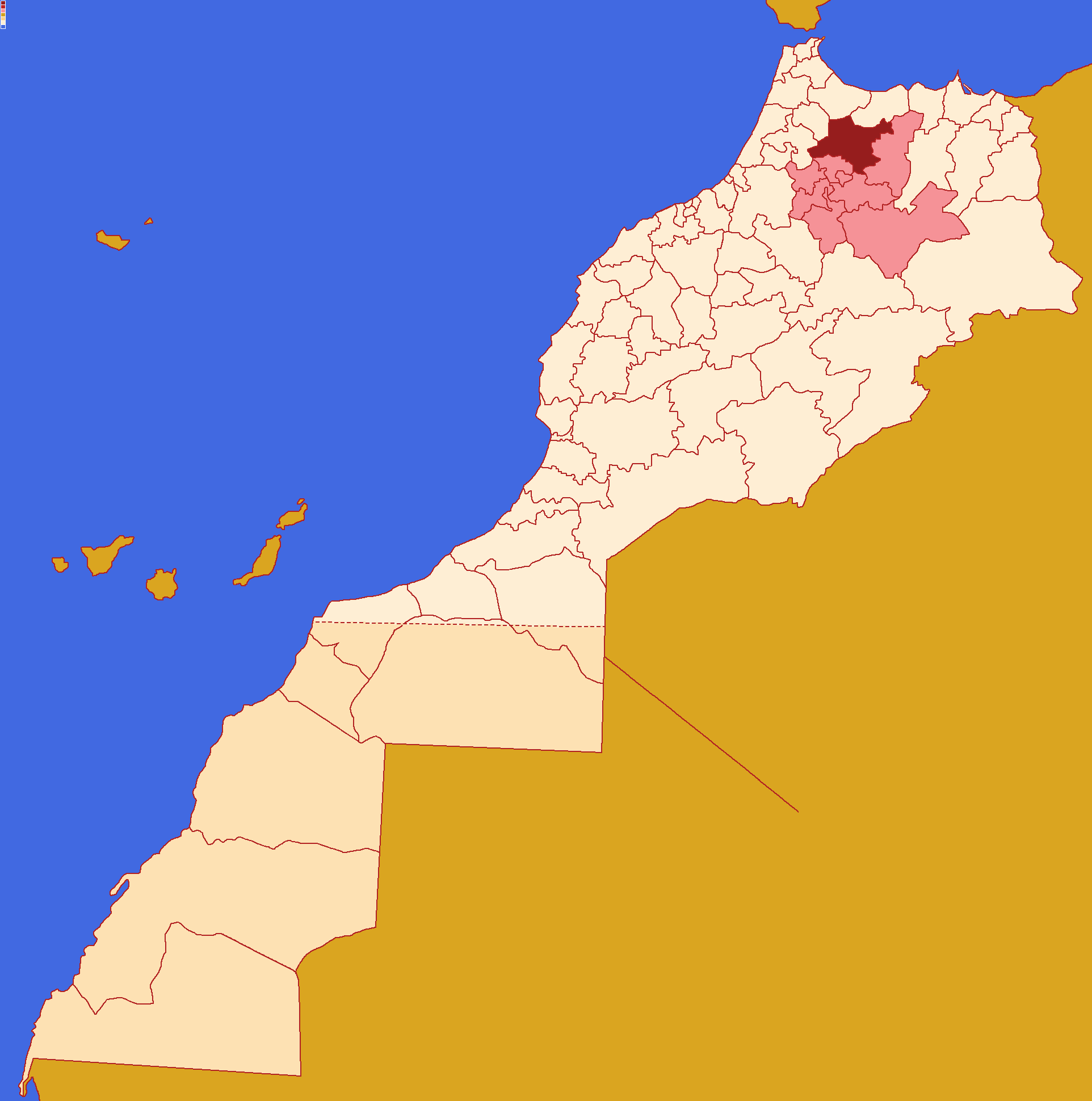 Localização da província de Taounate ,dentro da região de Fez-Meknès e dentro de Marrocos.Conforme a reforma administrativa de 2015.